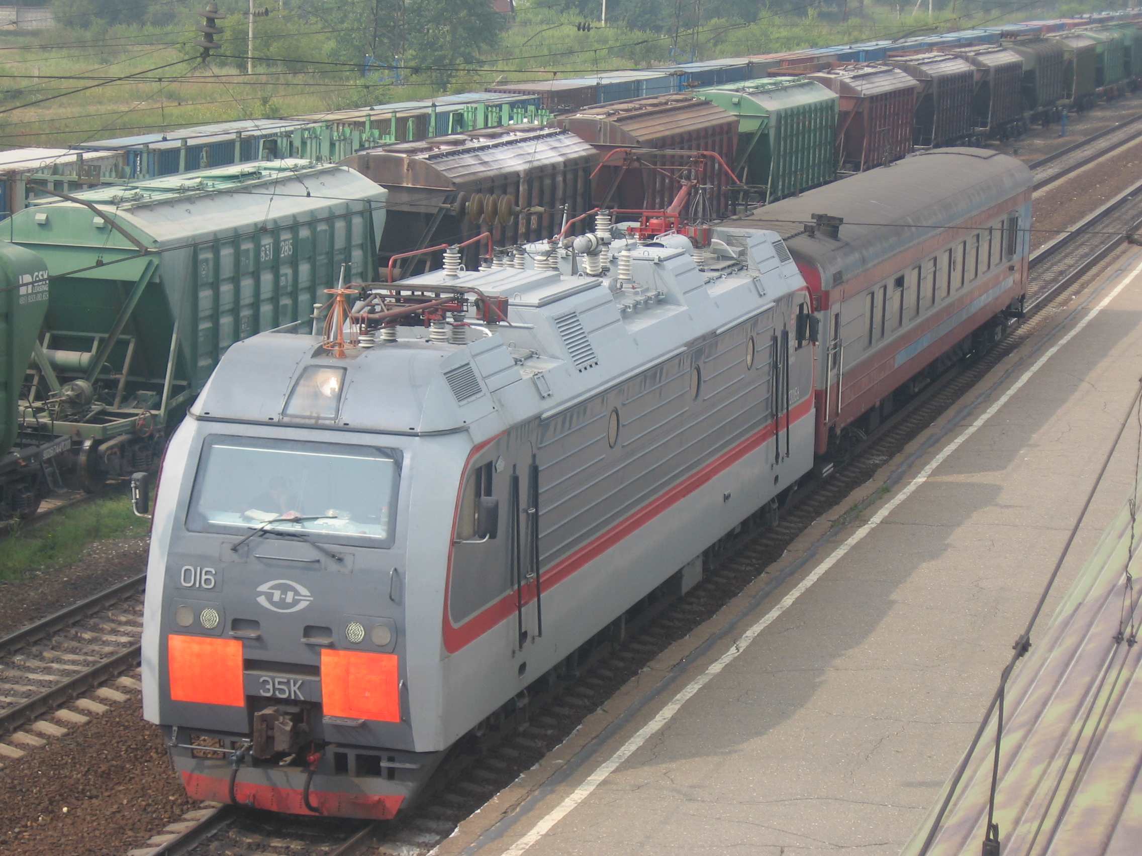 Э5К с поездом-путеизмерителем,Иркутская область